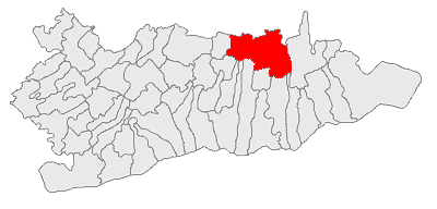 Categorie:Hărţi ale judeţului Călăraşi